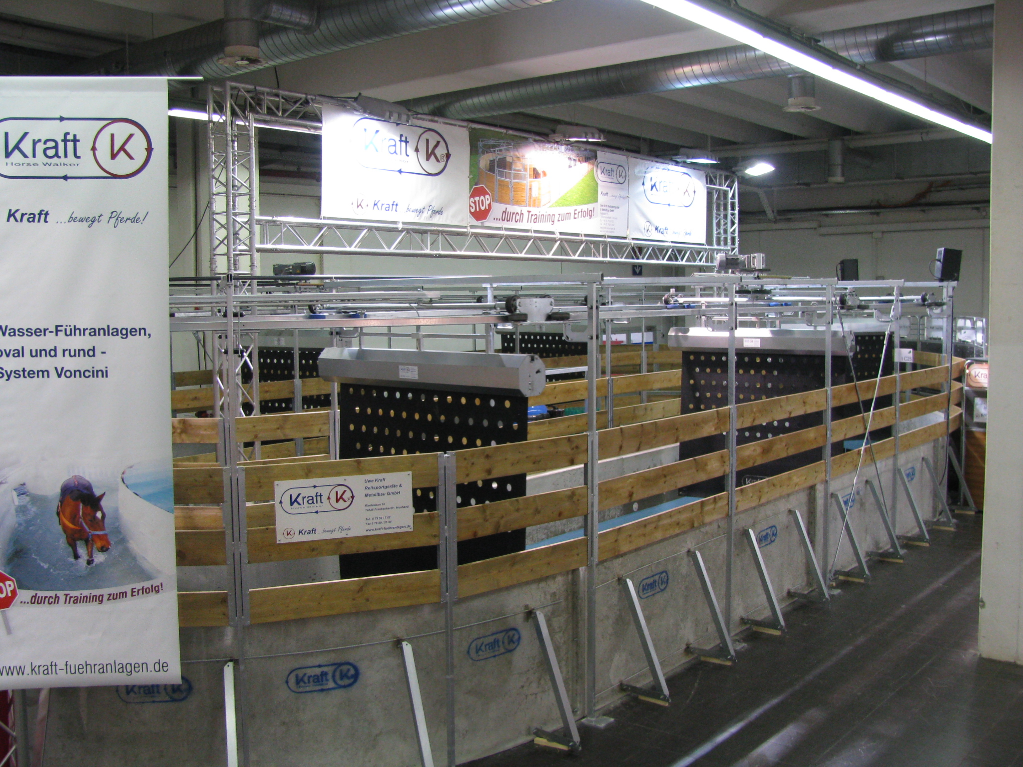 Wasser-Führanlage für Pferde bei der Messe Equitana, Essen, 2011